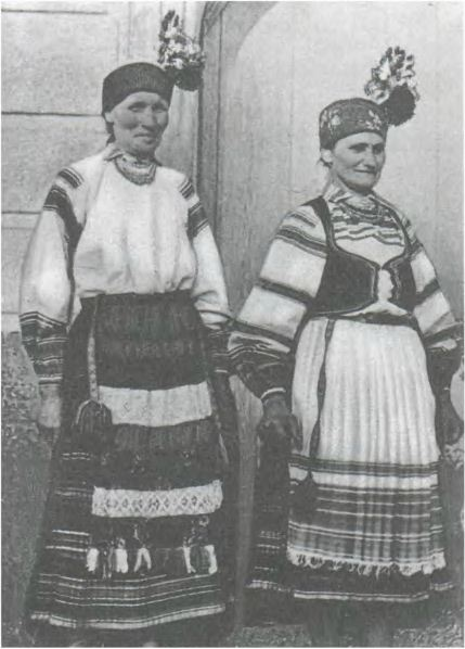 Ляхавіцкі строй. Жанчыны ў святочным убранні. Вёска Вялікае Падлессе. 1920-я г. Ляхавіцкі раён.